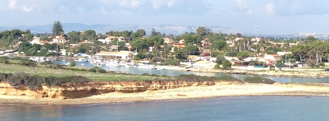 Baia di Ognina (Syracuse), Sicily.